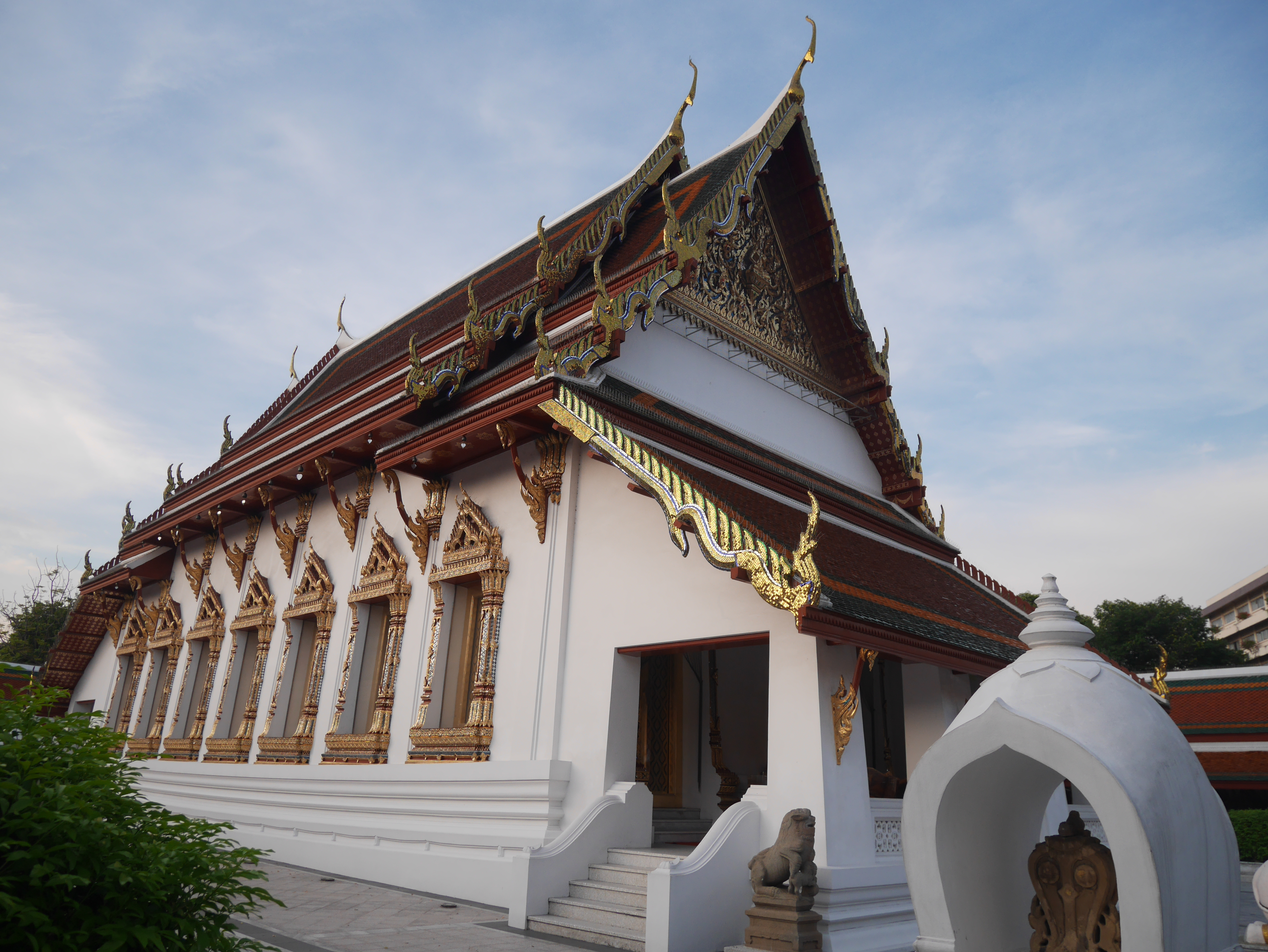 วัดดุสิดาราม (วัดเสาประโคน) เจ้าของบัญชี กสิณธร ราชโอรส เป็นเจ้าของบัญชีเดียวกับ บัญชี Phonlakrit Sunthornphon ของ Facebook บัญชี Tsutomu RIkimi ของ Google และ Panoramio .com บัญชี ซูบารุโยของ บัญชี สมาชิกหมายเลข 3915106 ของ กสิณธร ราชโอรส same account holder of Facebook (Phonlakrit Sunthornphon),Google and (Tsutomu RIkimi) and ซูบารุโย at